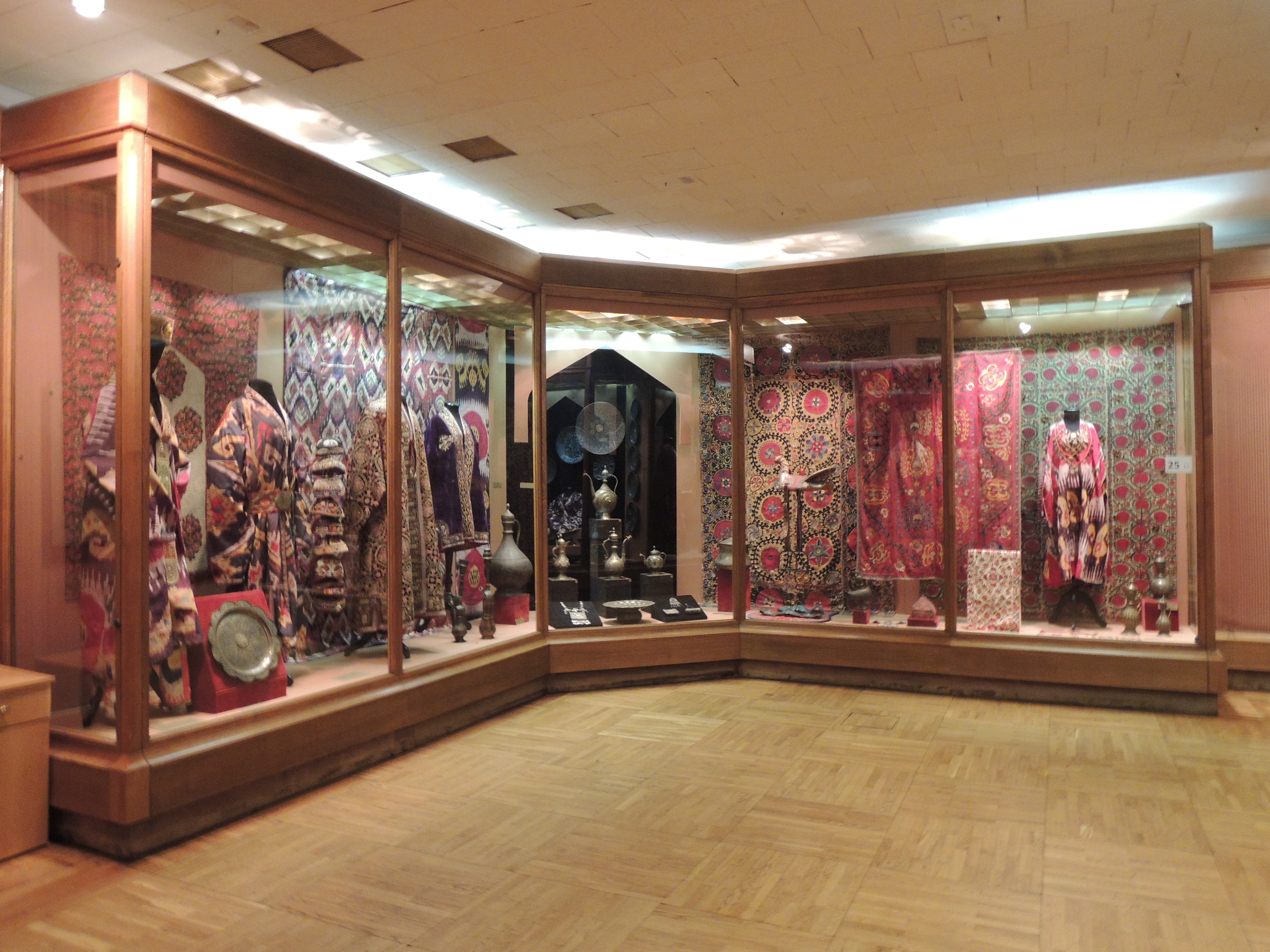 Государственный музей Востока (Москва)